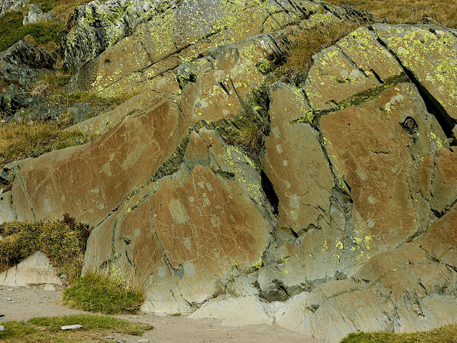 Dalle de Fontanalbe montrant des araires et des "champs" (avec tout à gauche la gravure dite l'Arbre de vie)